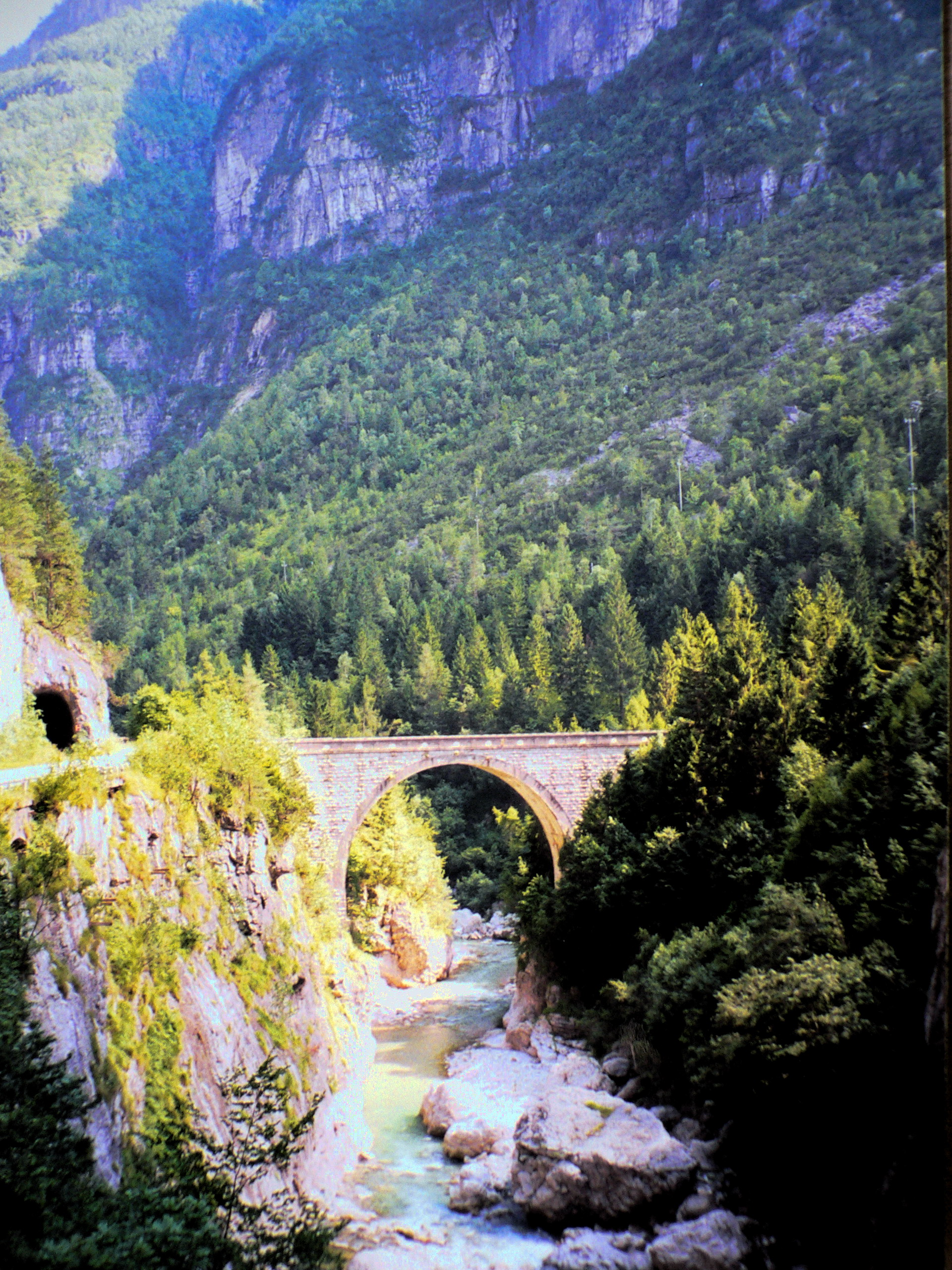 SR 203. Il vecchio tracciato attaversava il Pònt dei Castéi